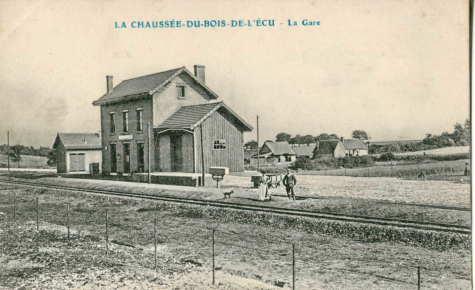 Carte postale ancienne, sans mention d'éditeur : LA CHAUSSEE-DU-BOIS-D'ECU - La Gare Il s'agit d'une gare de la ligne de chemin de fer secondaire à voie métrique Ligne Estrées-Saint-Denis - Froissy - Crèvecœur-le-Grand